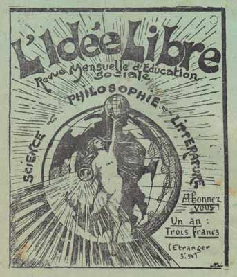 L’Idée libre est une revue libertaire néo-malthusienne et une maison d'éditions, fondés le 1er décembre 1911 par André Lorulot.